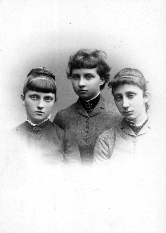 Erzherzogin Luise von Österreich-Toskana, Blanca de Borbón und Prinzessin Marie Louise von Bourbon-Parma.